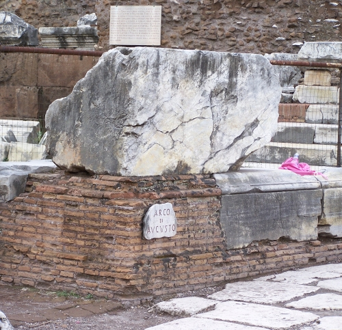 Łuk Augusta - filar południowy